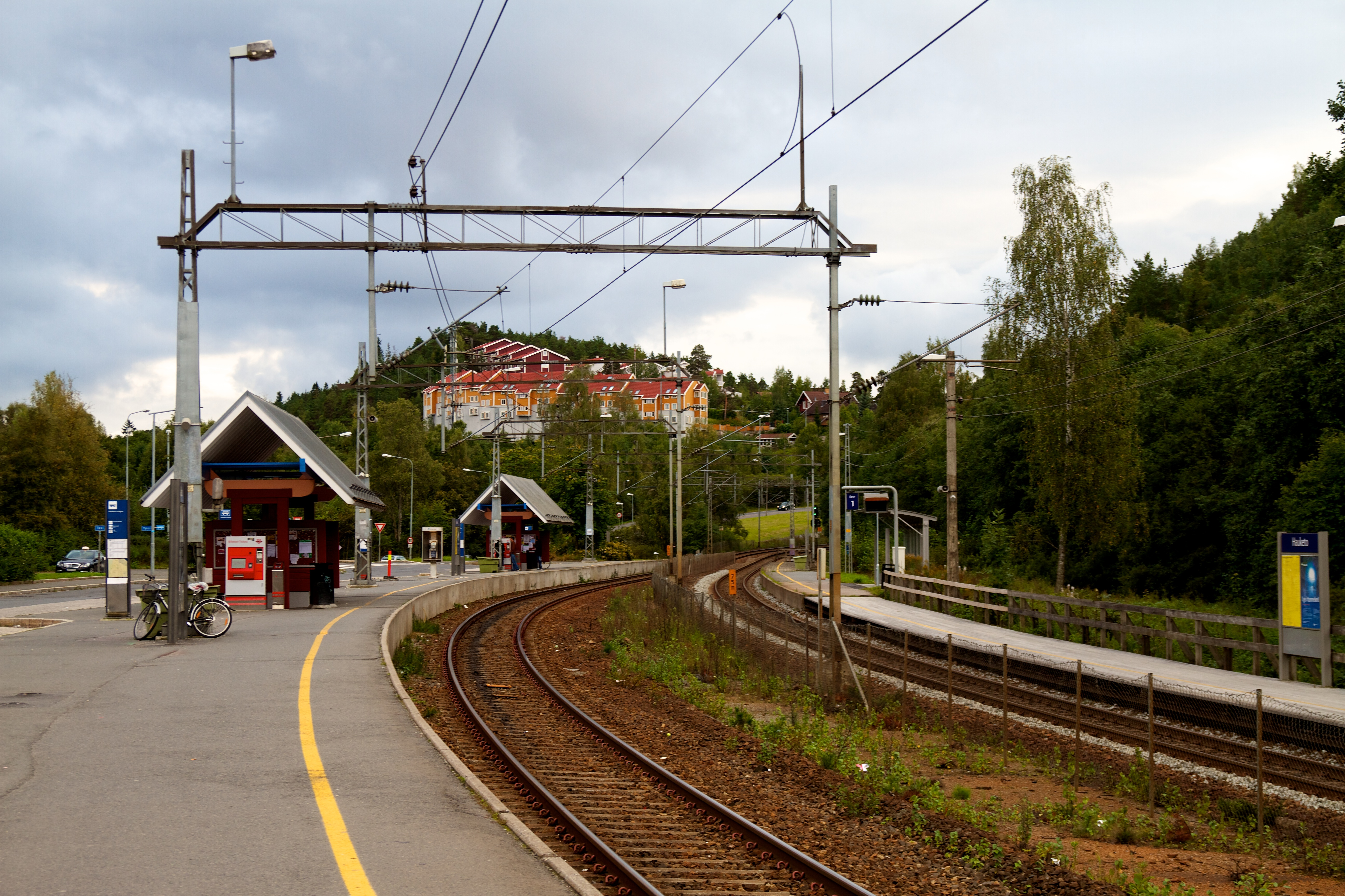 Hauketo stasjon